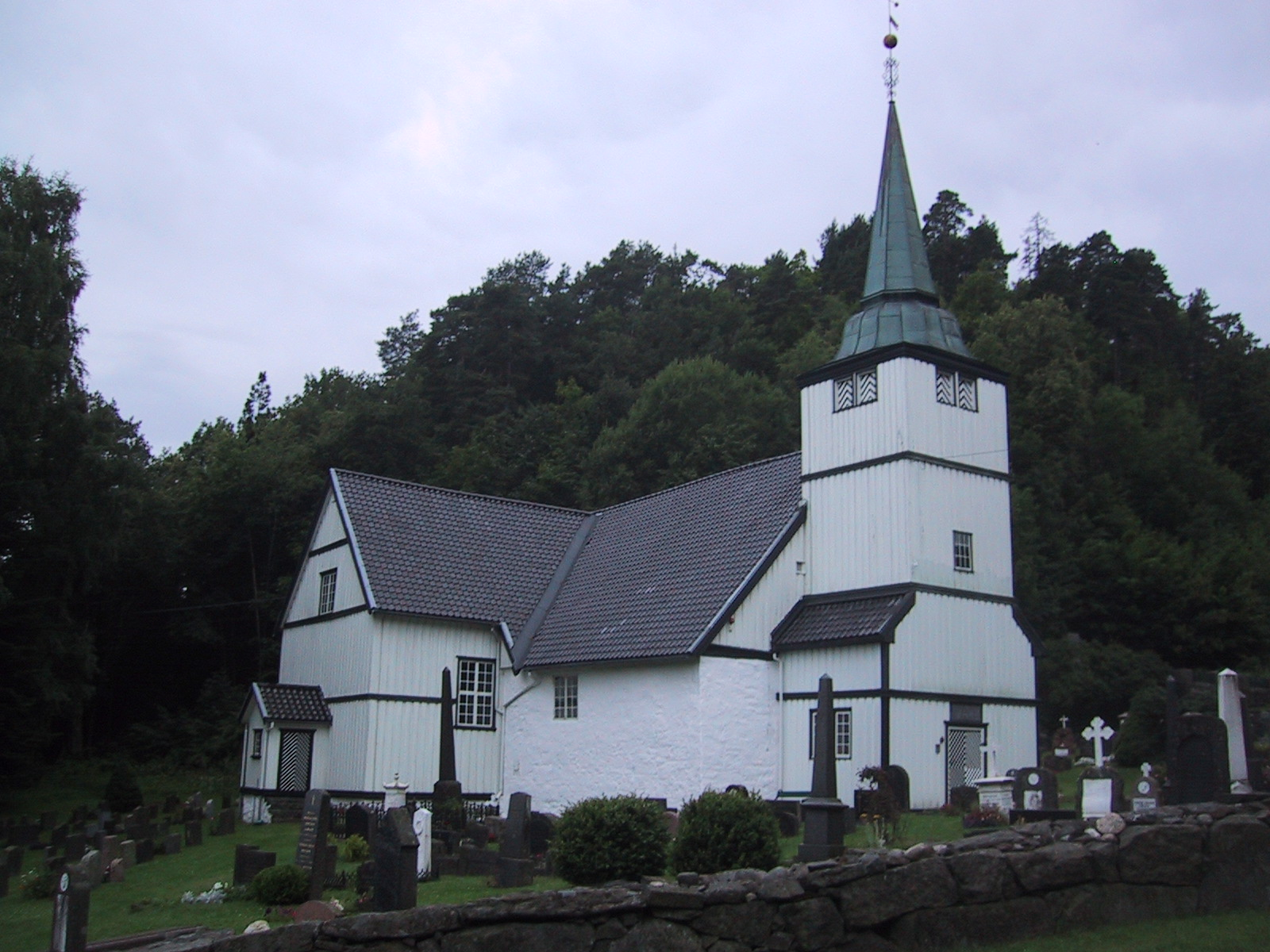 Dypvåg kyrkje sett frå nordvest